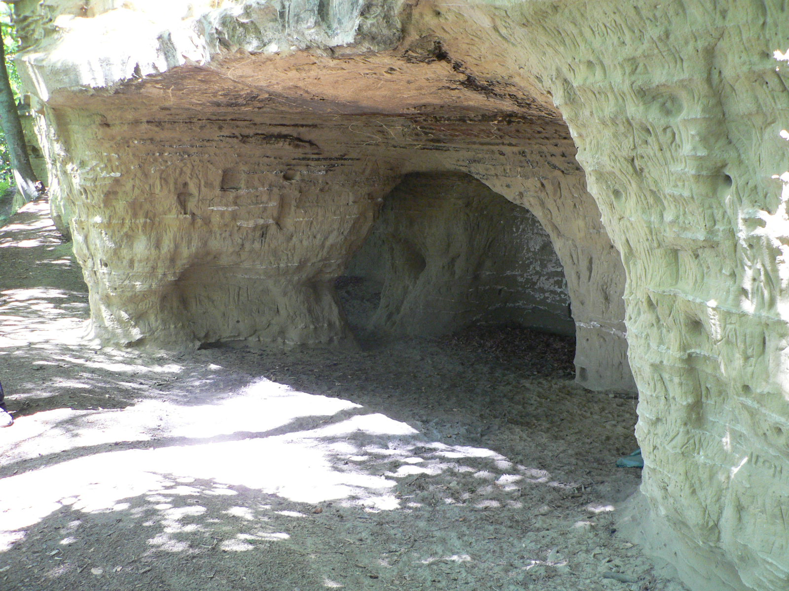 Heidenhöhlen bei Zizenhausen, geologische Sehenswürdigkeit, Naturdenkmal (?)